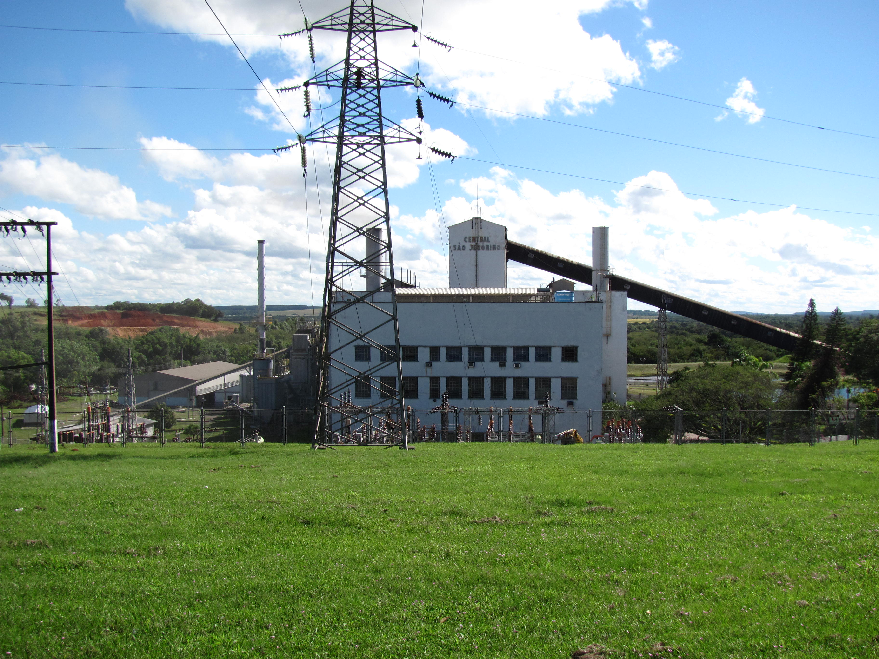 Usina Termoelétrica de São Jerônimo